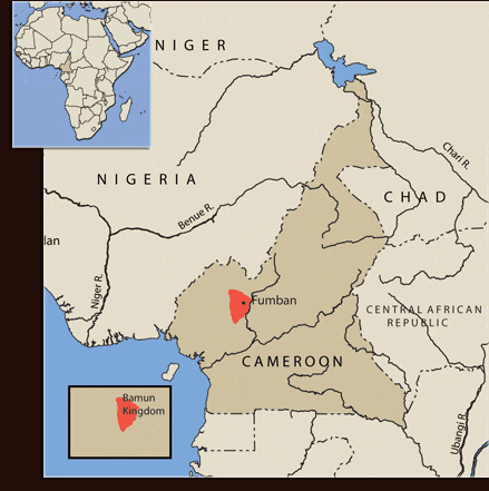 Bamun Kingdom